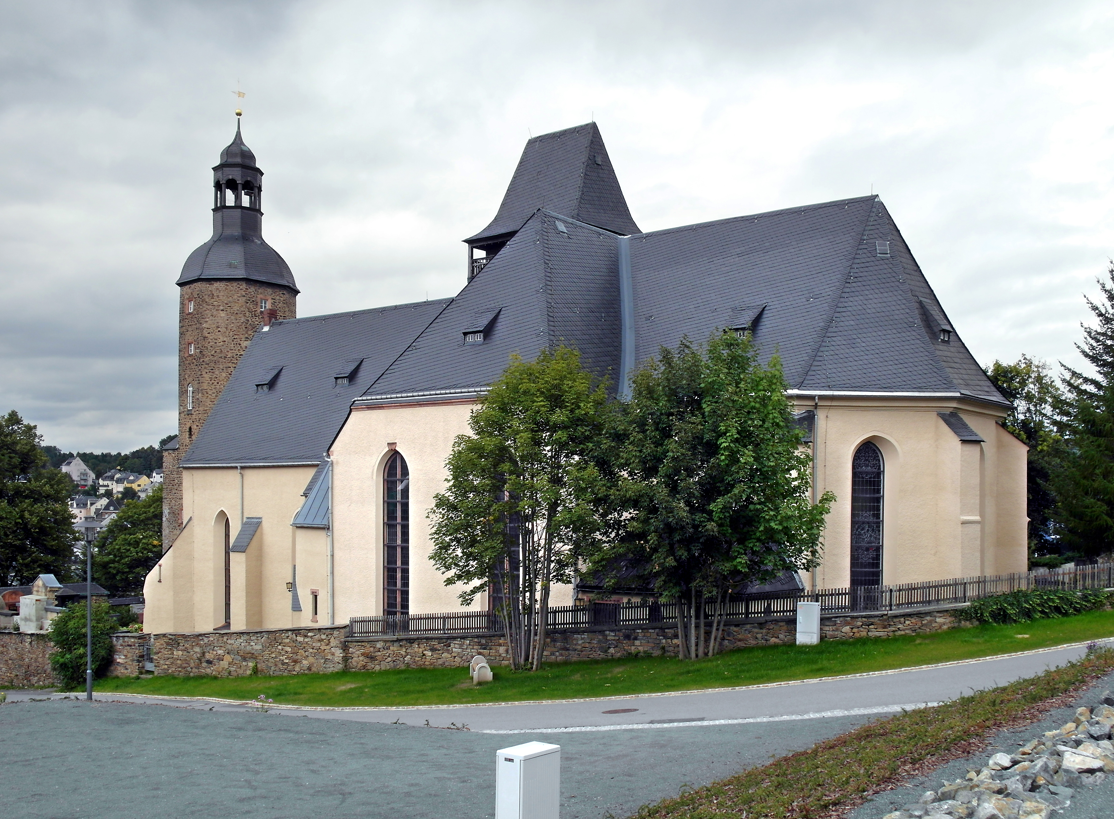 11.09.2017 09468 Geyer, Am Lotterhof: St. Laurentiuskirche (GMP: 50.623522,12.925082). Sicht von Südosten. [SAM1983.JPG]20170911420DR.JPG(c)Blobelt